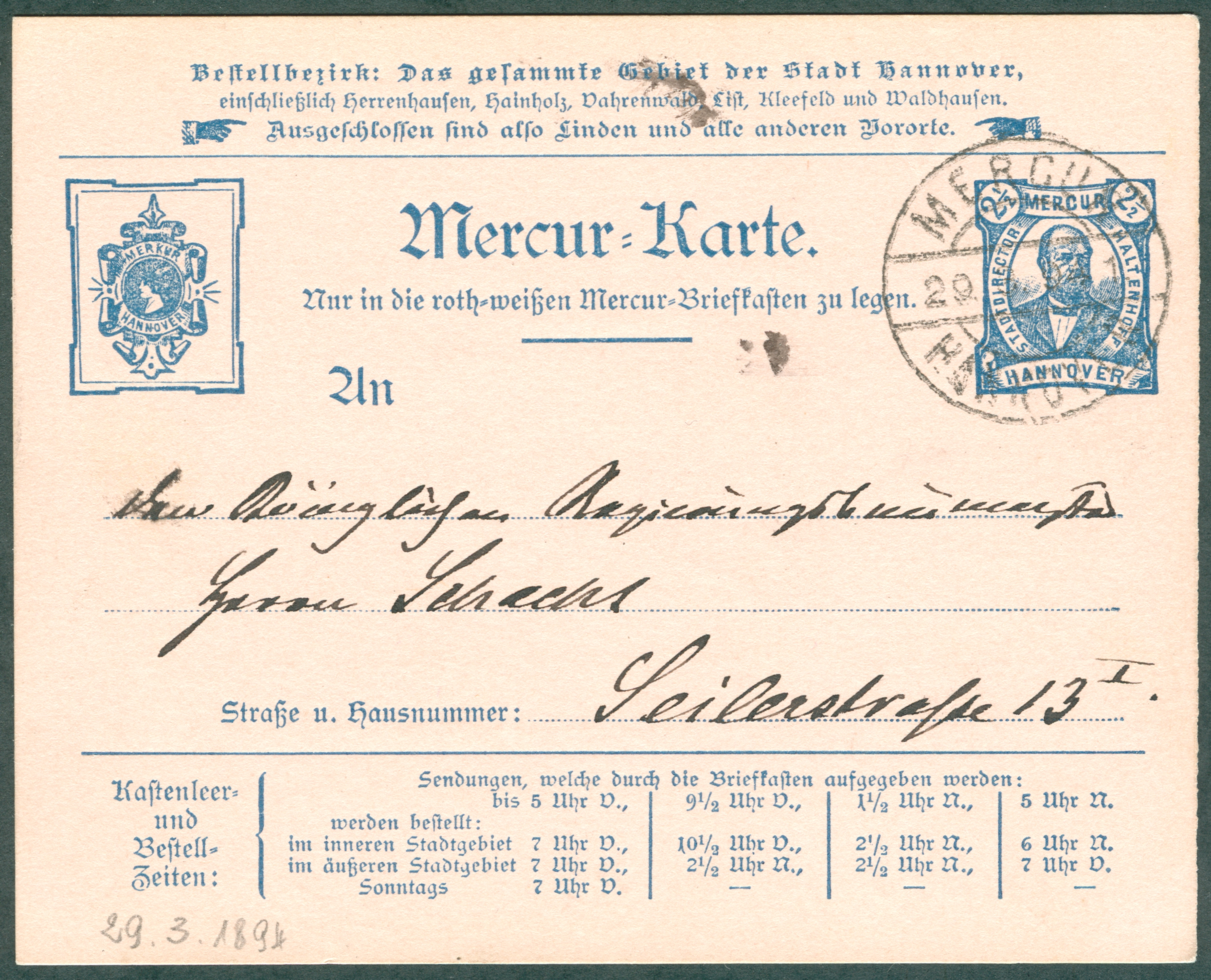 Mercur-Karte, in Sammlerkreisen "Ganzsache" genannt, der Mercur Privat-Stadtbrief-Expedition, postalisch "gelaufen" (abgestempelt und befördert) Ende März 1894. Neben einer aufgedruckten Briefmarke mit dem Stadtdirektor Haltenhoff werden unter anderem die eigenen, rot-weißen Briefkästen erwähnt, die Zustellbezirke - jedoch noch ohne Linden und - bei Einlieferung vor bestimmten Leerzeiten - eine Zustellmöglichkeit auch bis Sonntags 7 Uhr vormittags. Die Karte wurde adressiert an "den Königlichen Regierungs-Baumeister Herrn Schacht" in der Seilerstraße 17, Erster Stock.